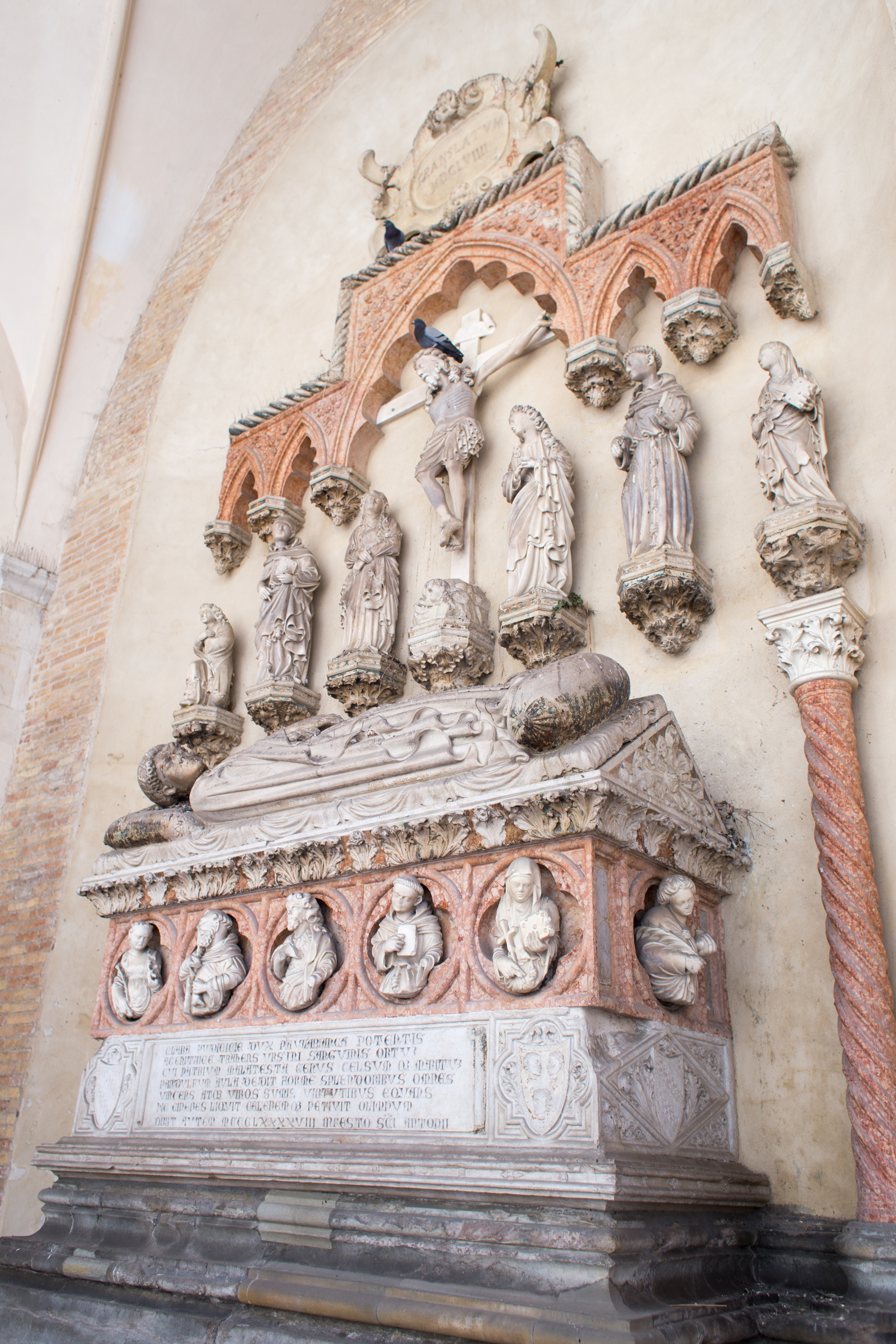 San Francesco (Fano) monumenti - Storia&Storie This is a photo of a monument which is part of cultural heritage of Italy.